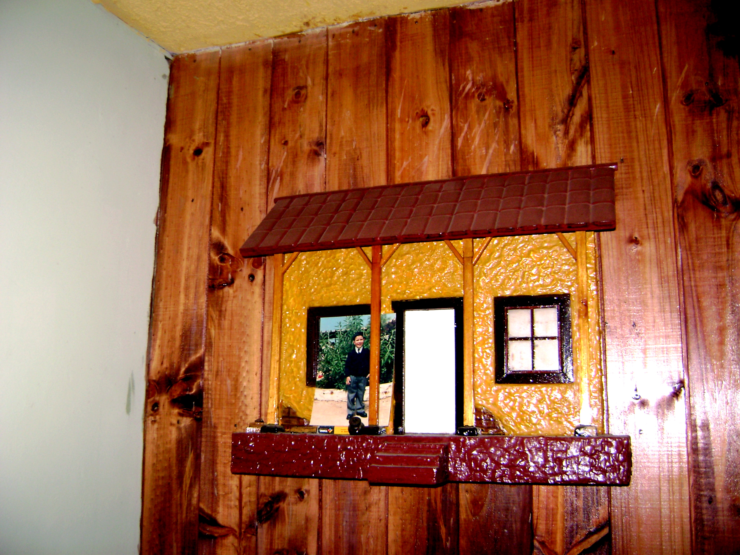 Una artesanía de una pequeña casa, hecha por mi padre.